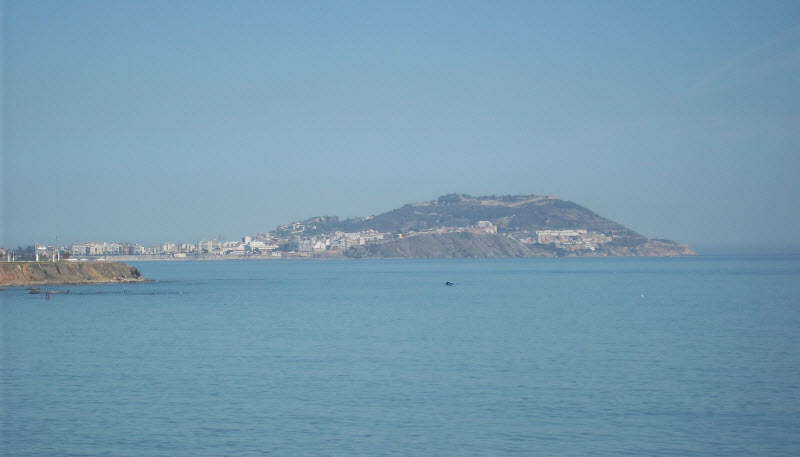 Vista de la península de Almira (Ceuta) desde Castillejos (Finideq), en Marruecos